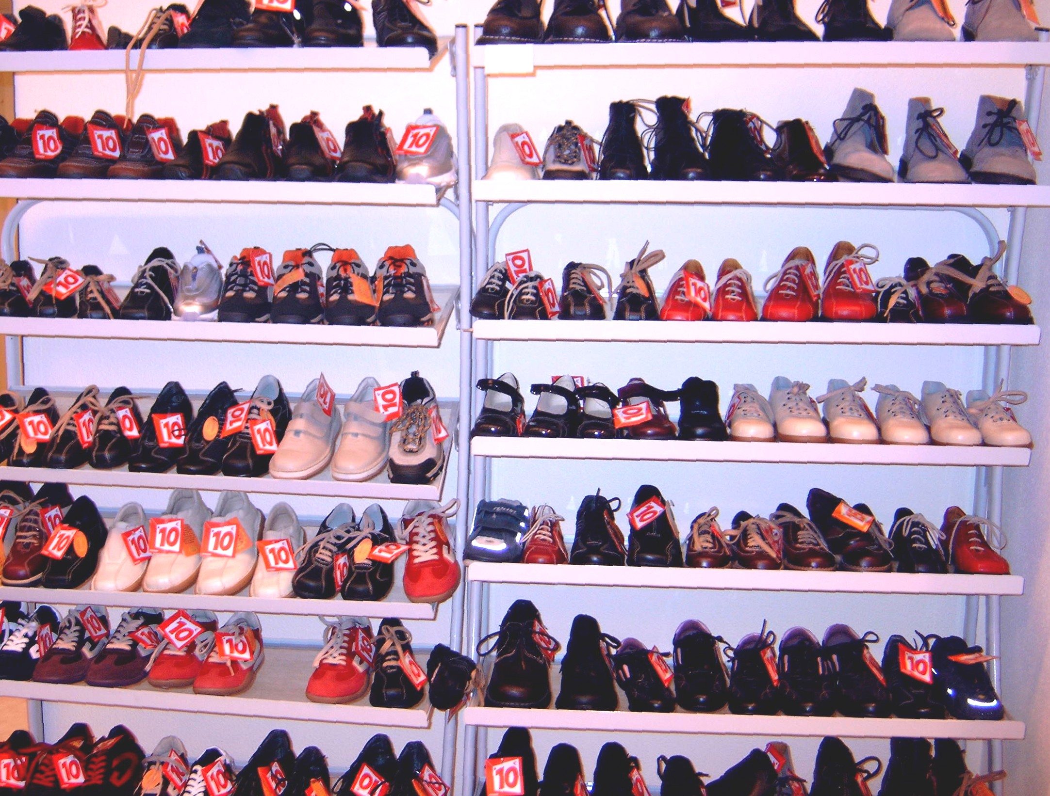 Opruiming in een schoenenwinkel, januari 2006. Eigen opname.